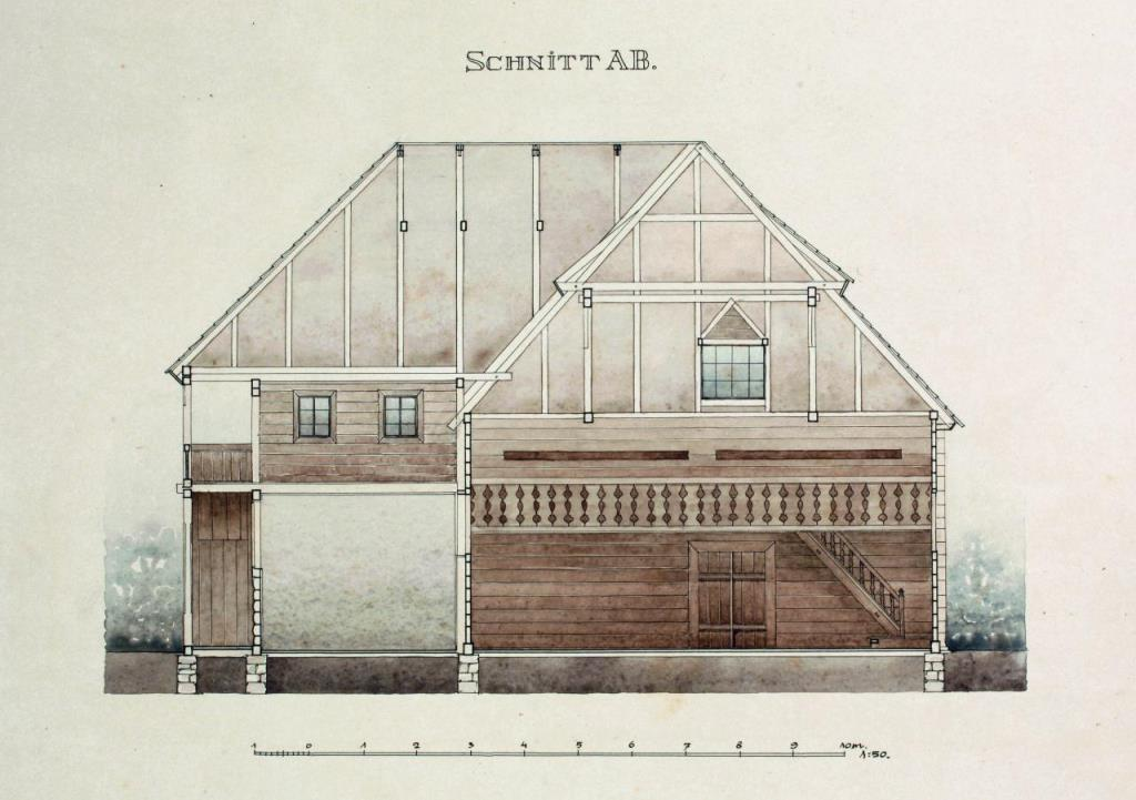 Малюнок дерев'яної синагоги в Печеніжині.